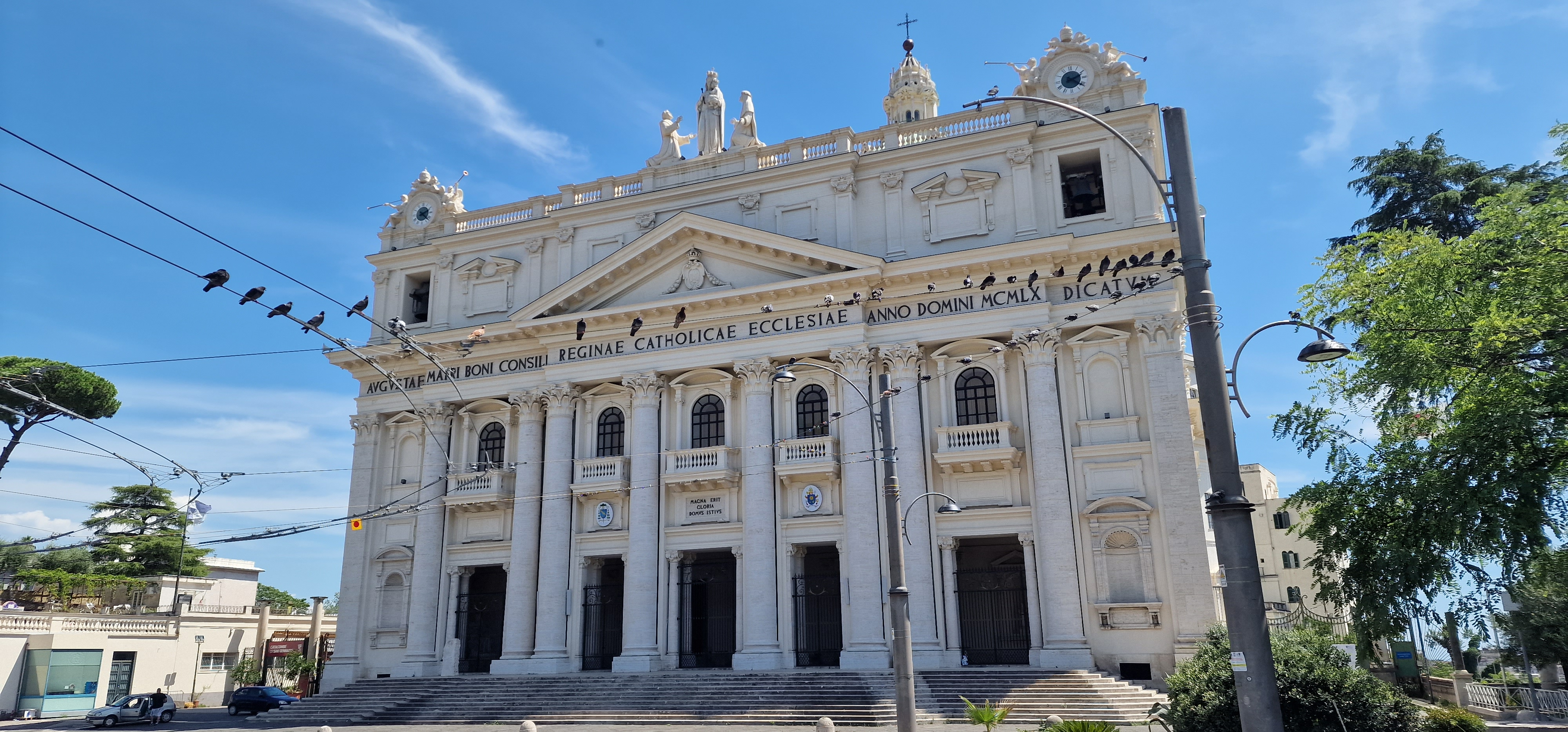 Facciata Incoronata Madre (Napoli)